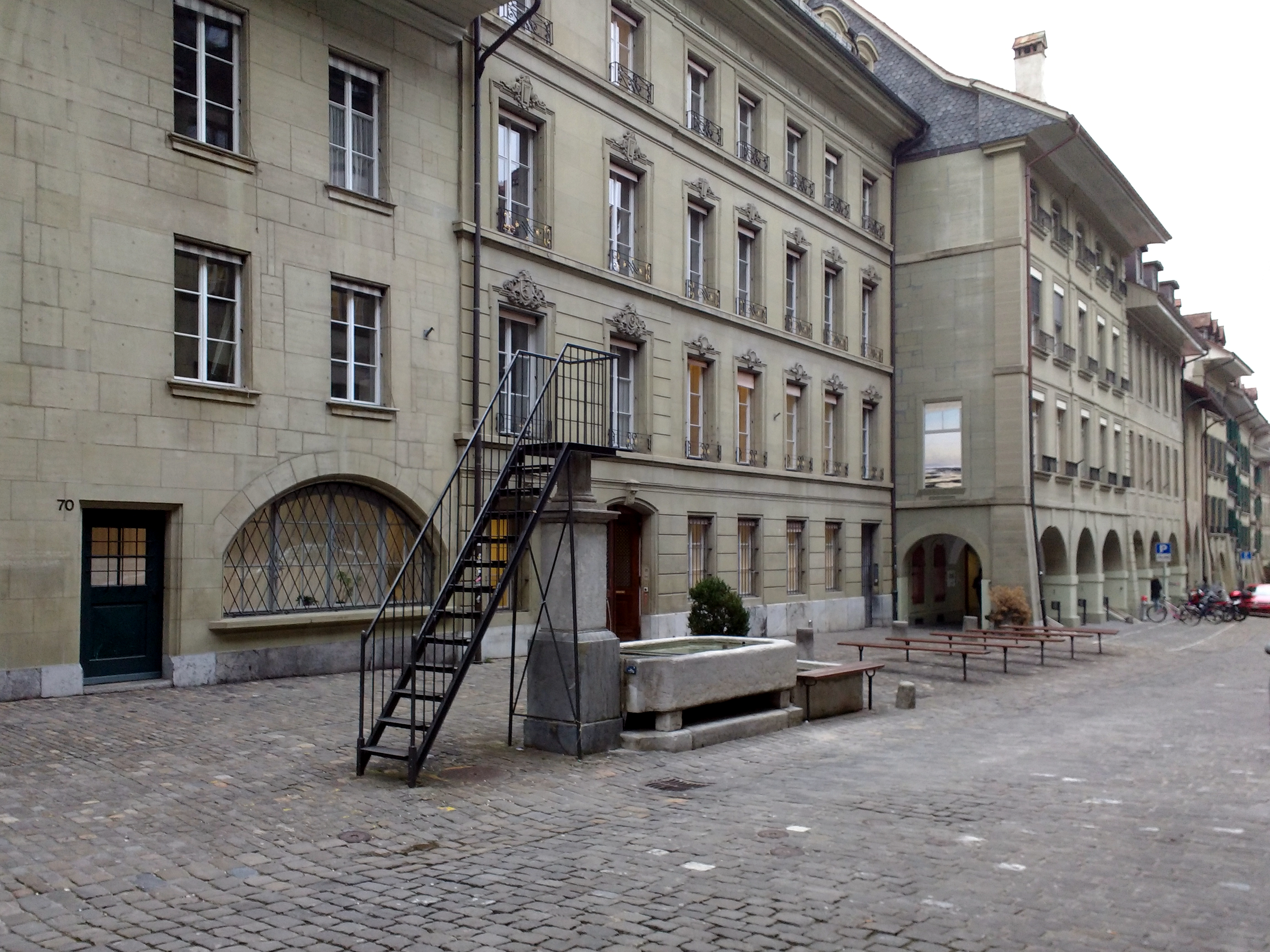 Sicht auf Brunnenanlage mit Publikumsbänken